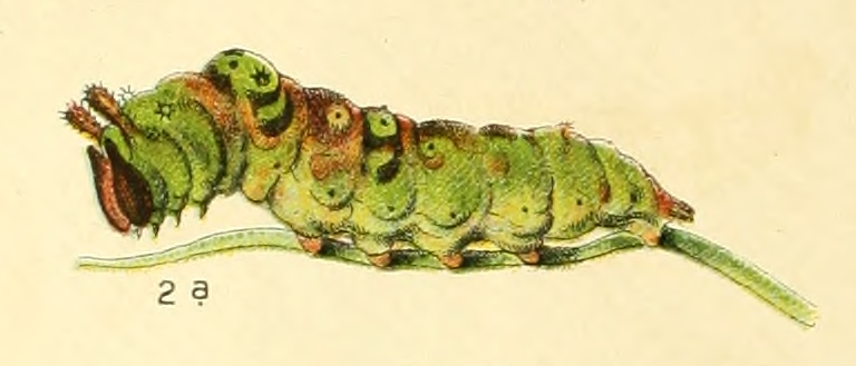 Limenitis populi larva